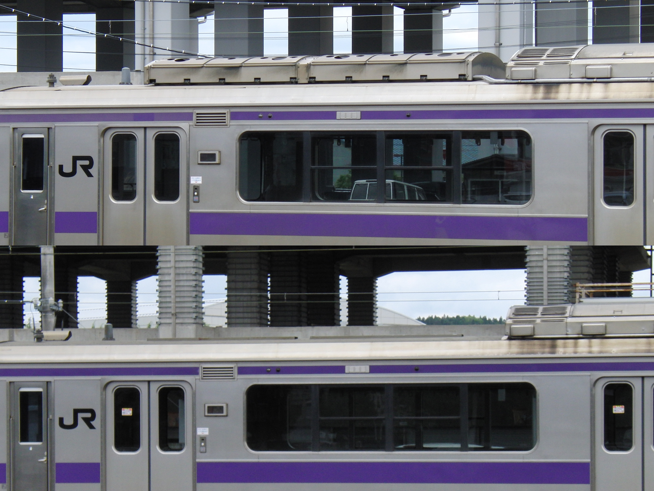 JR東日本 701系電車 ブレーキ抵抗器 （上：クモハ701-1008、下：クモハ701-1011 ブレーキ抵抗器非搭載）